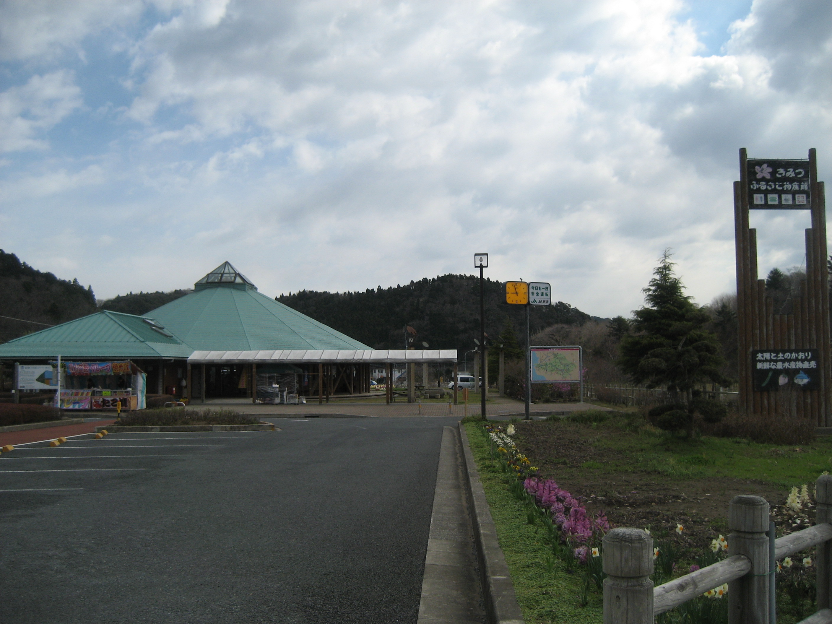 道の駅ふれあいパークきみつ全景